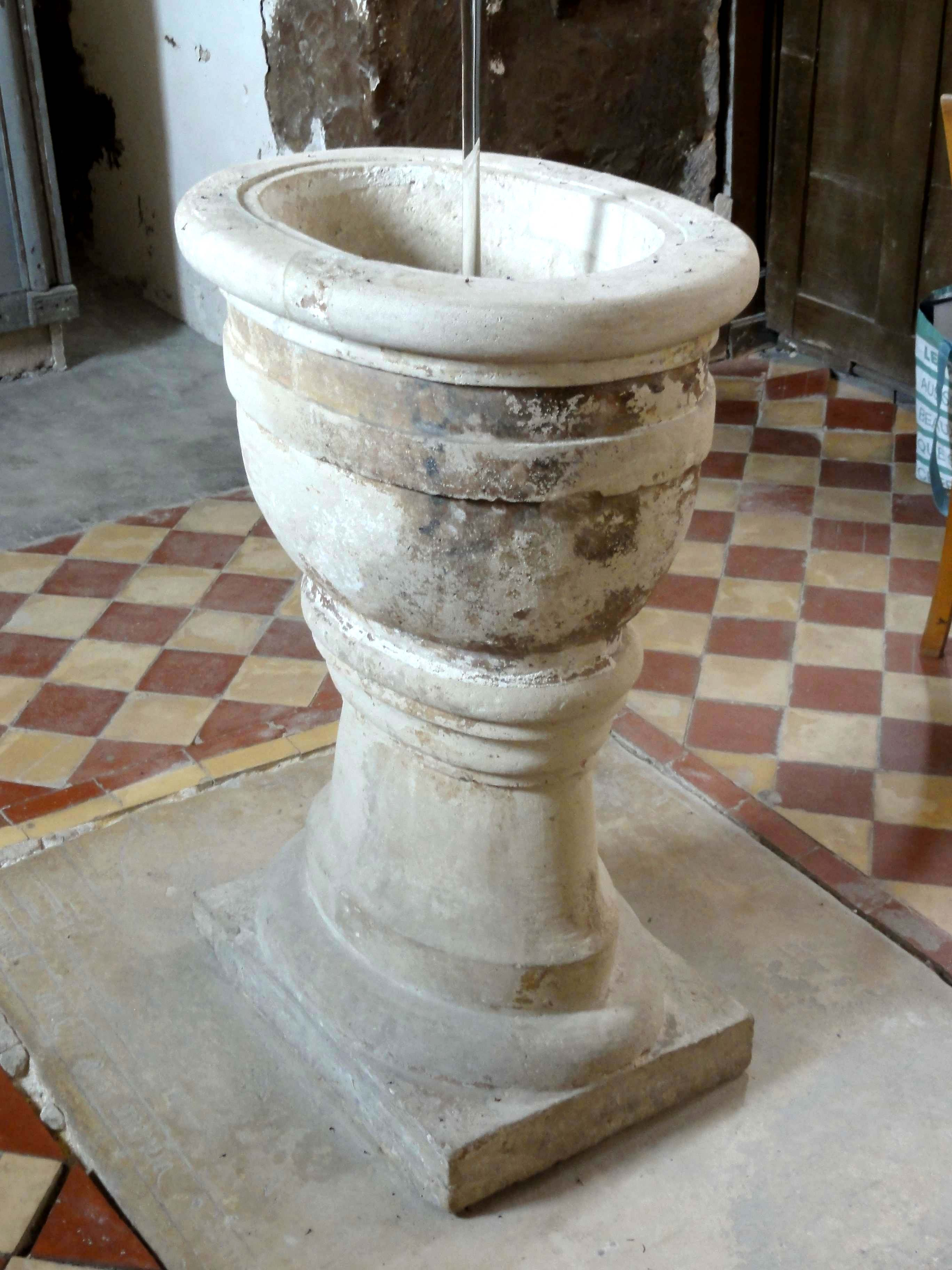 Fonts baptismaux.